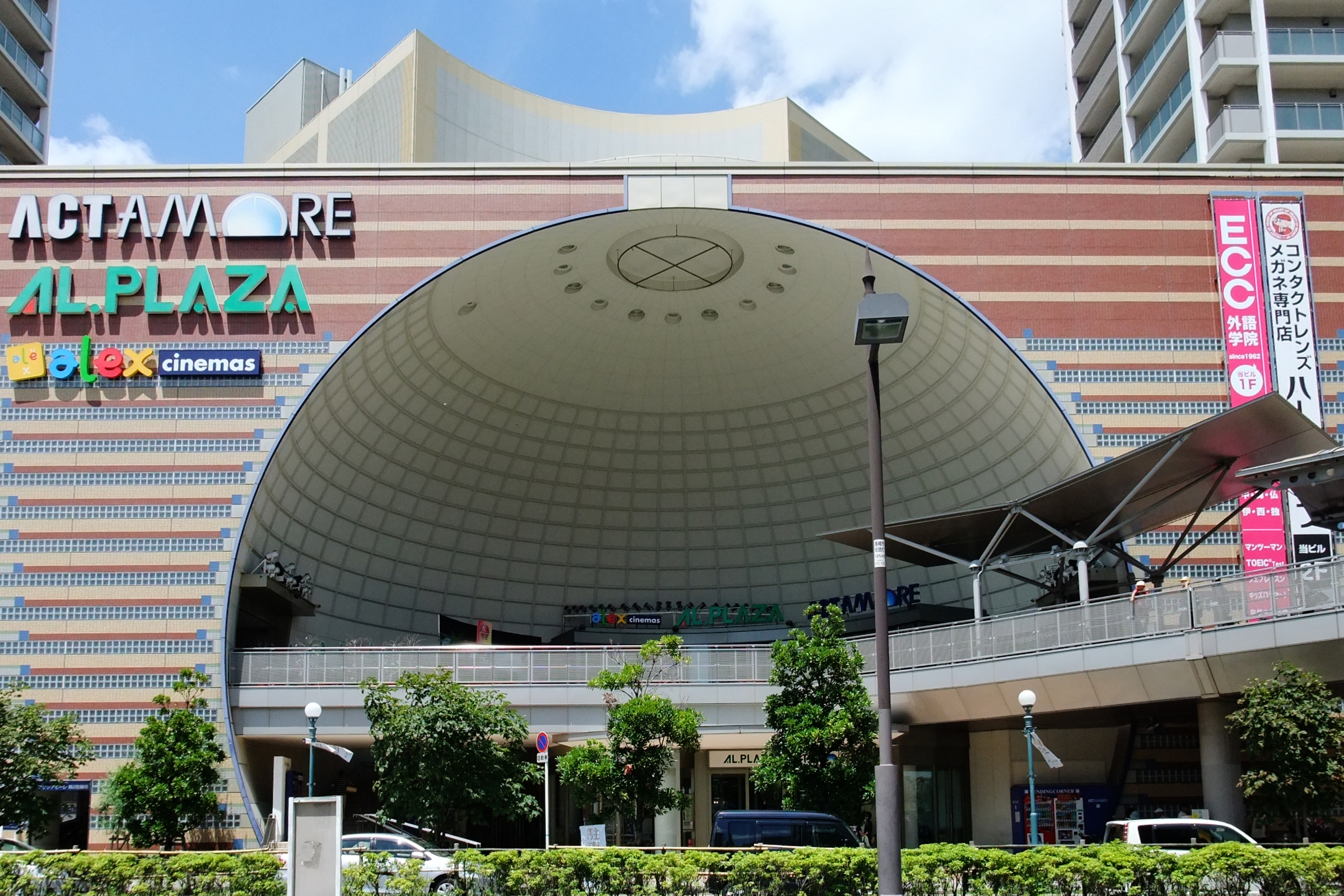 AL PLAZA in Takatsuki, Osaka prefecture, Japan